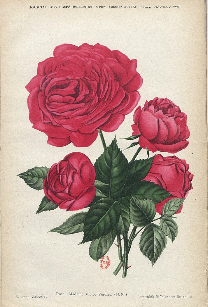 Rose 'Madame Victor Verdier' (hybride remontant obtenu en 1863 par Eugène Verdier), illustration parue dans le Journal des roses, n° de décembre 1901. Chromolithographie par De Tollenaere (Bruxelles), dessin de Louise-Cécile Descamps-Sabouret (1855-1916).